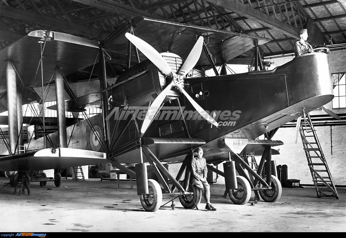 Handley Page in depo